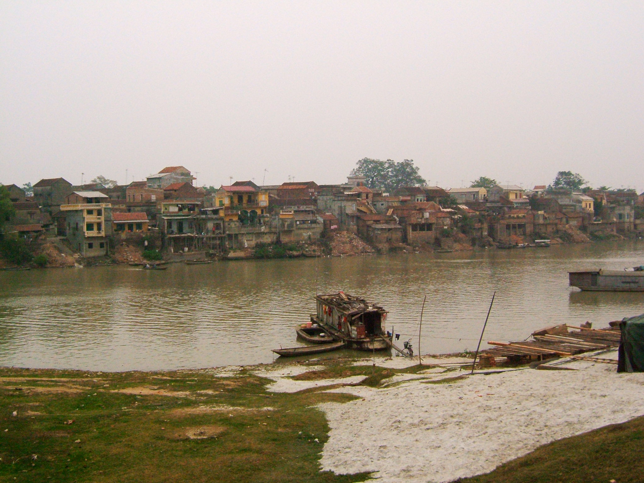 Làng Vân Xá, tức làng Vân, xã Vân Hà, huyện Việt Yên, tỉnh Bắc Giang nơi có sản vật rượu Làng Vân nổi tiếng. Làng Vân Xá nằm bên sông Cầu.